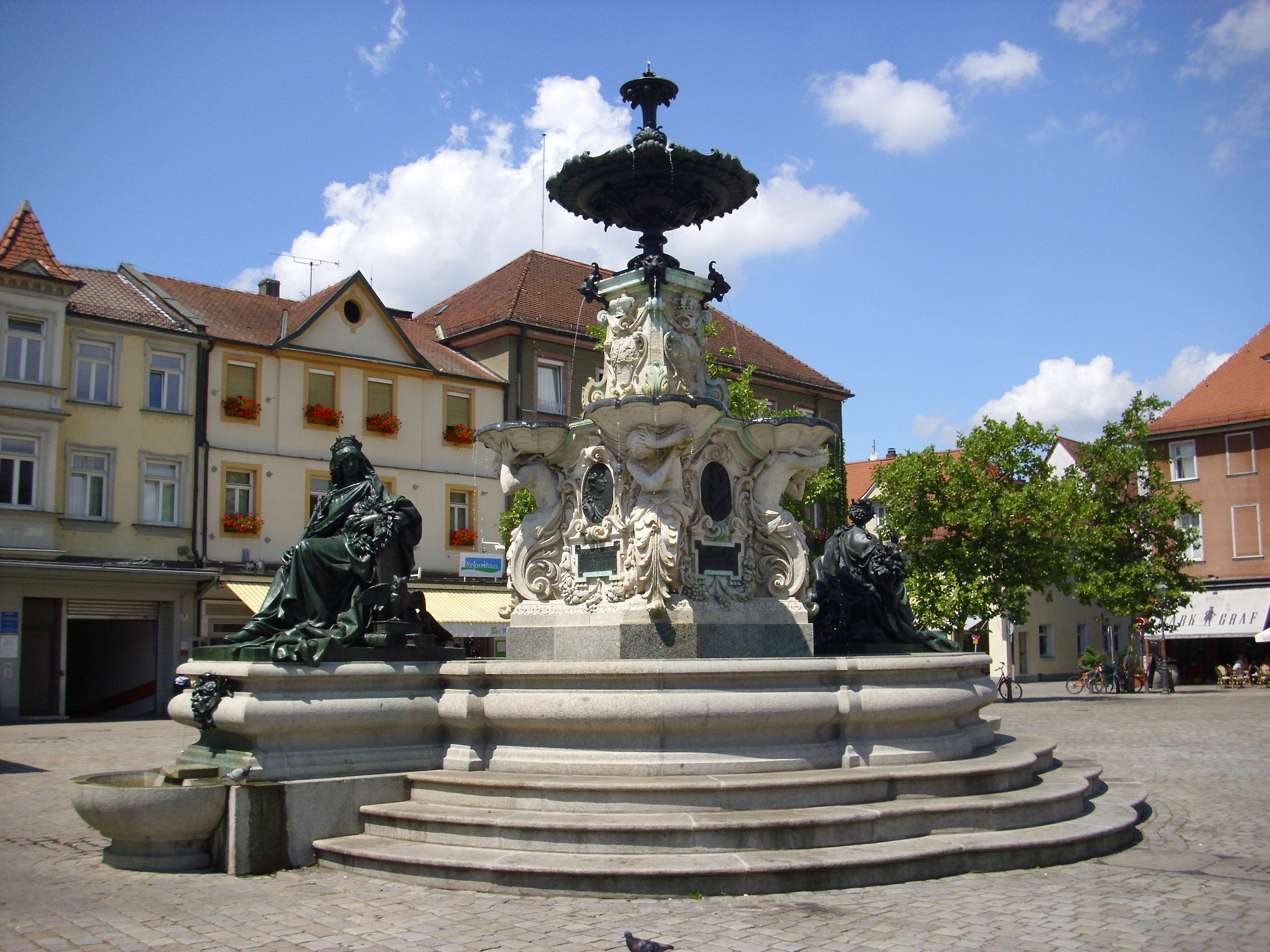 Paulibrunnen Erlangen Juli 2010 11